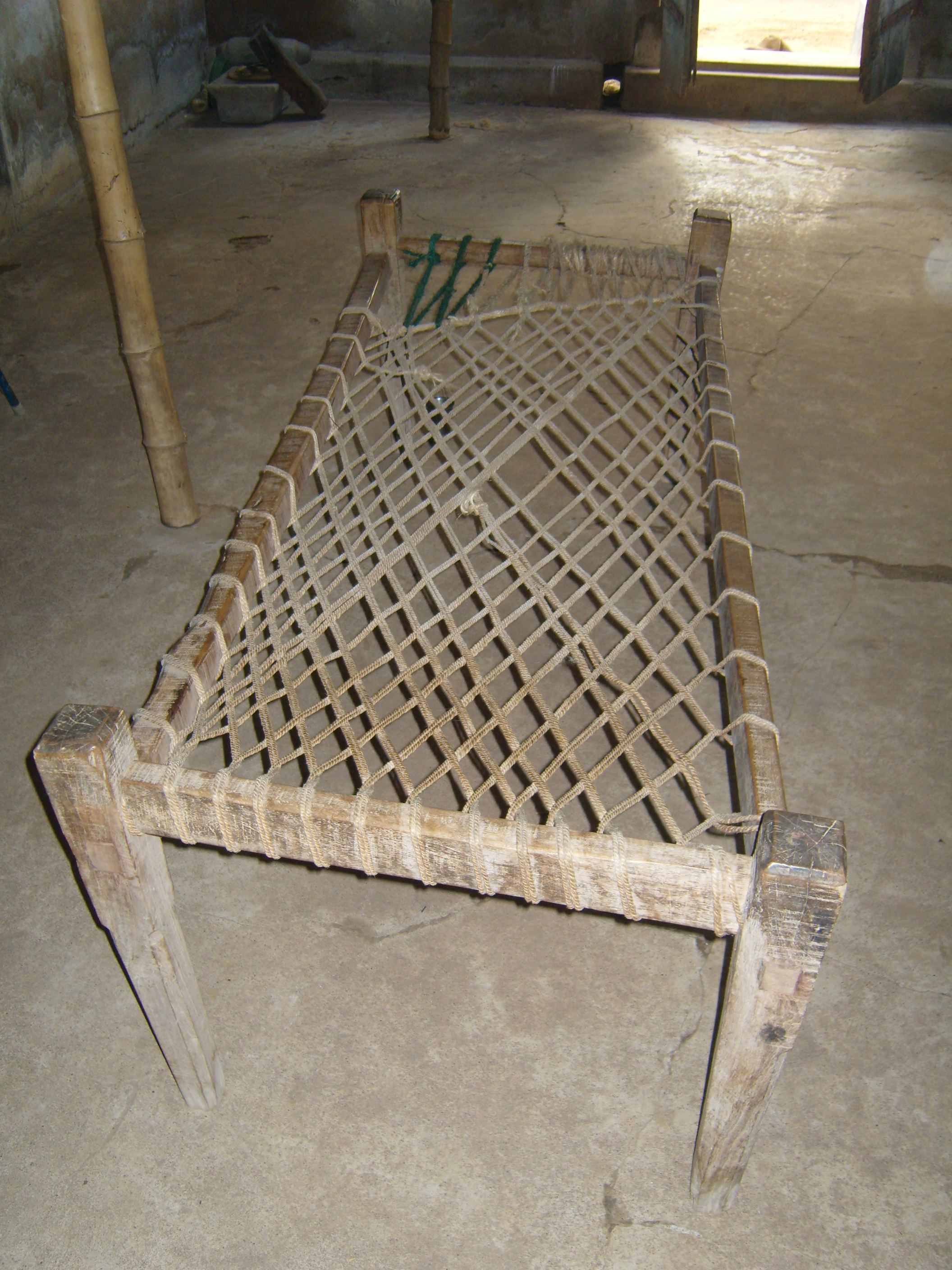 இந்த நிழற்படம் என்னால் எடுக்கப்பட்டது. பொதுப் பயன்பாட்டுக்கு அளிக்கிறேன். -- Template:வார்ப்புரு:Cc-by-sa